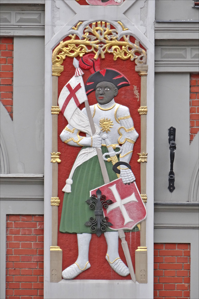 Bas-relief polychrome à droite de la porte d'entrée de la Maison des Têtes Noires représentant Saint Maurice La Maison des Têtes Noires, détruite durant la dernière guerre, a été reconstruite et rouverte en 1999, elle se trouve sur la place de l'Hôtel de Ville. Le bâtiment initial date de 1334, il abritait la Grande Guilde de la ville hanséatique de l'époque, puis a été le siège de la confrérie des Têtes Noires (jeunes marchands allemands) dont le saint Patron : Saint Maurice est représenté sous les traits d'un Maure. Voir la maison de la même confrérie hanséatique à Tallinn : Cette maison en briques est de style renaissance néerlandais avec des éléments décoratifs datant du 19ème siècle.